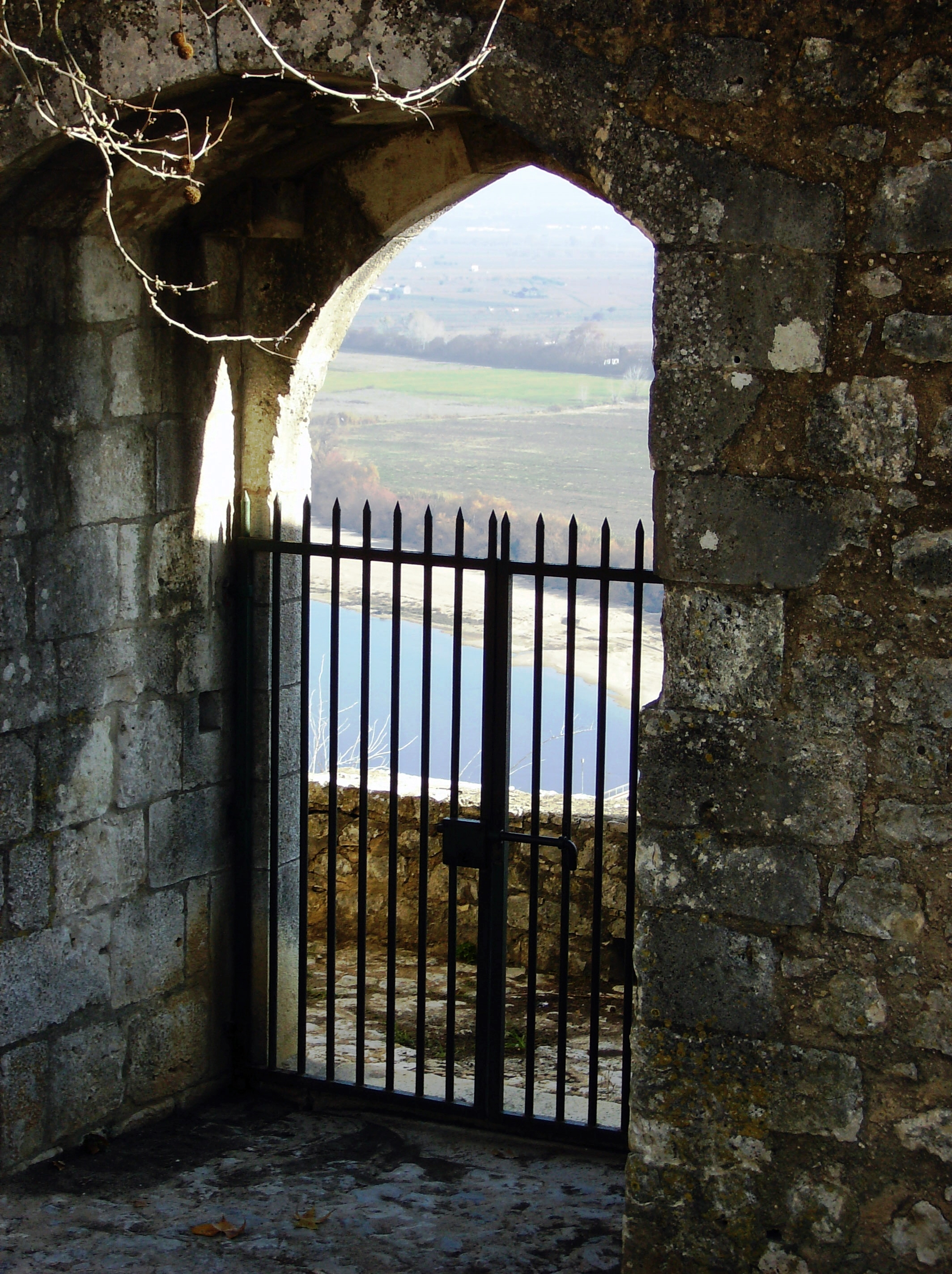 Castelo de Santarém, Portugal: Porta do Sol; ao fundo, o rio Tejo.